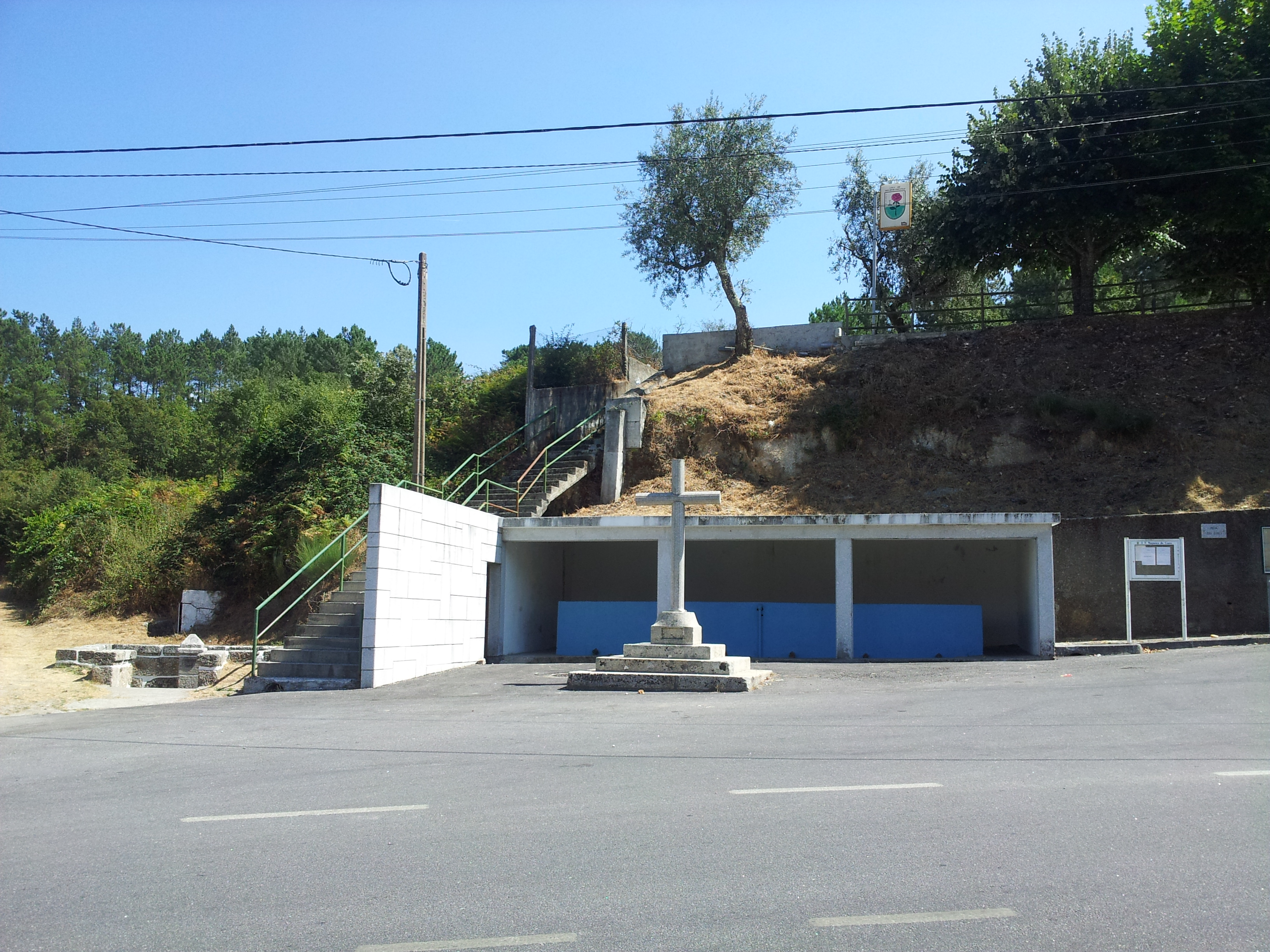 A fonte, o Cruzeiro e os Tanques (na Aldeia de Nogueira)